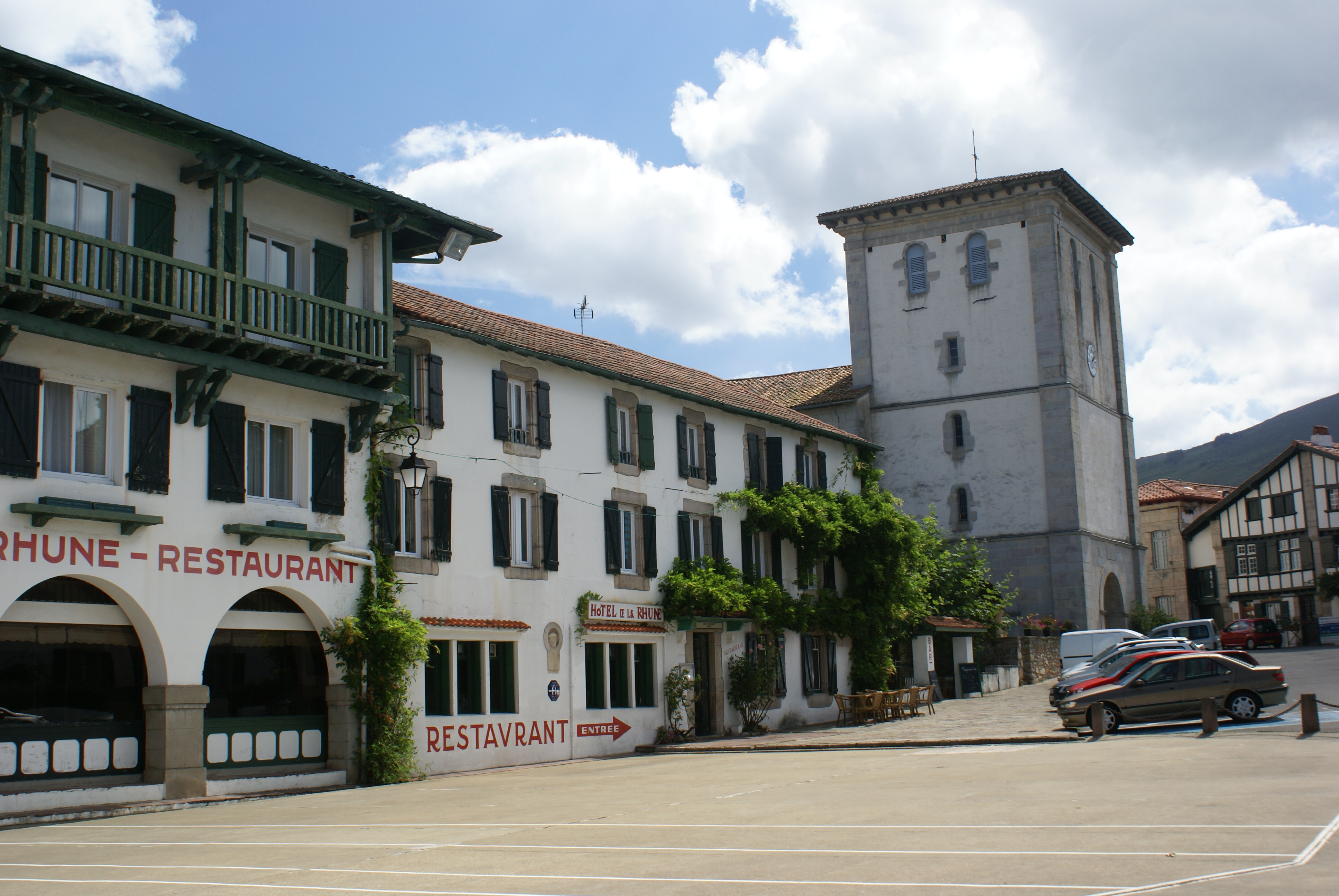 Église d'Ascain sur la place du village, avec en premier plan l'hôtel de la Rhune.